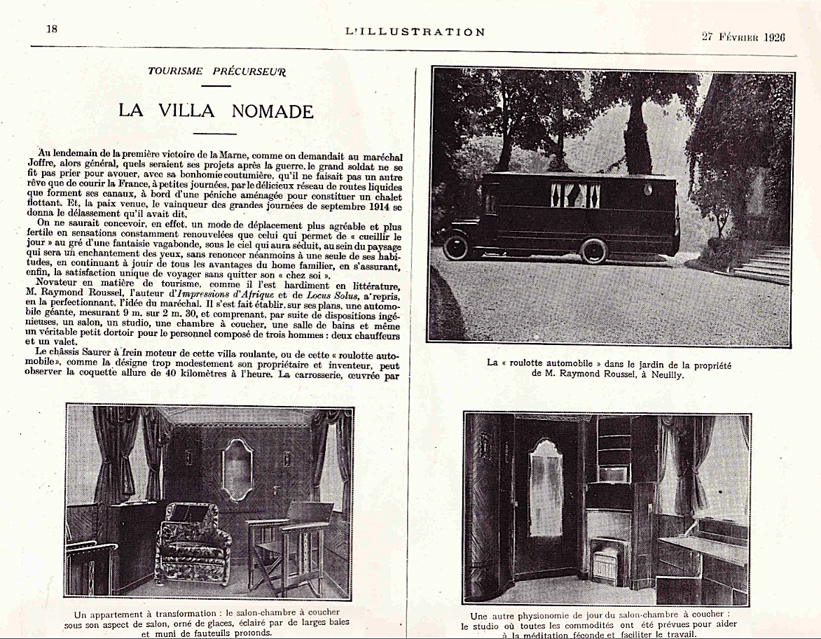 Tourisme précurseur: La Villa Nomade, In: L'Illustration — up page.